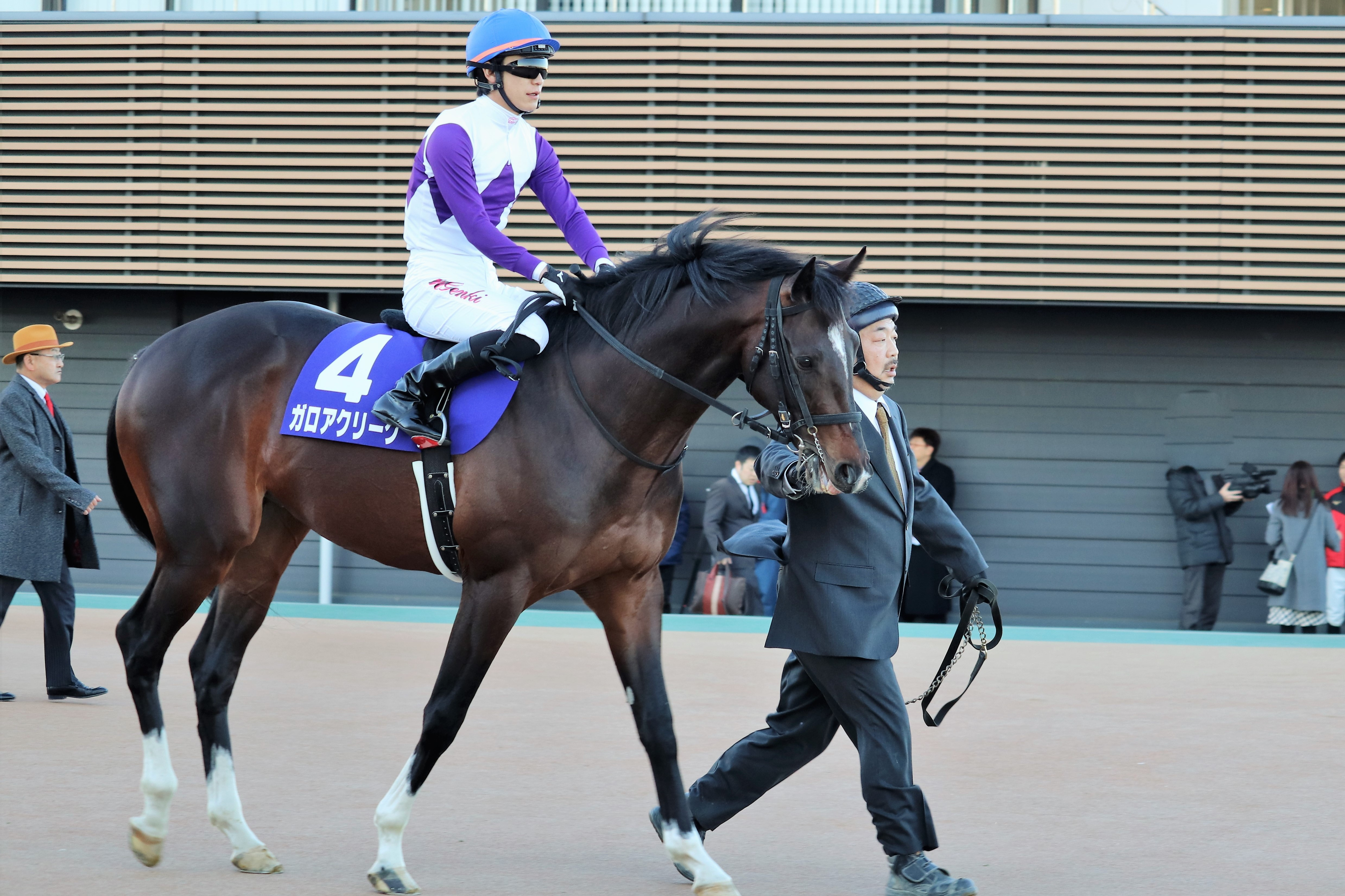 2019年のホープフルステークス、馬場入場前のガロアクリーク